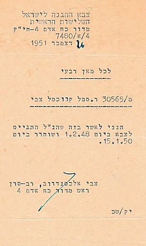 צבי כרמל, אישור שירות בהגנה